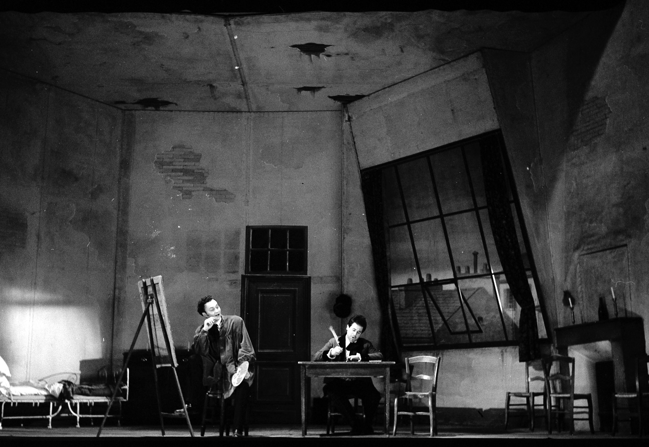 Théâtre du Capitole. Le 14 Mars 1968. Vue de la représentation de La vie de Bohème au théâtre du Capitole.